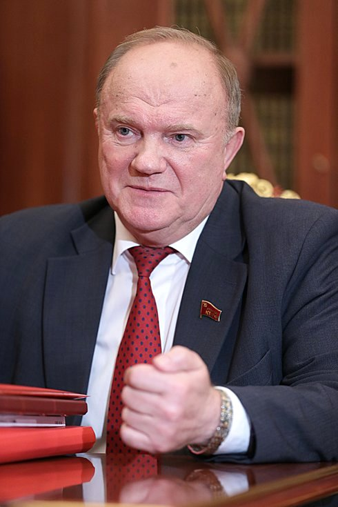 Руководитель фракции «Коммунистическая партия Российской Федерации» в Государственной Думе, председатель Центрального комитета КПРФ Геннадий Зюганов